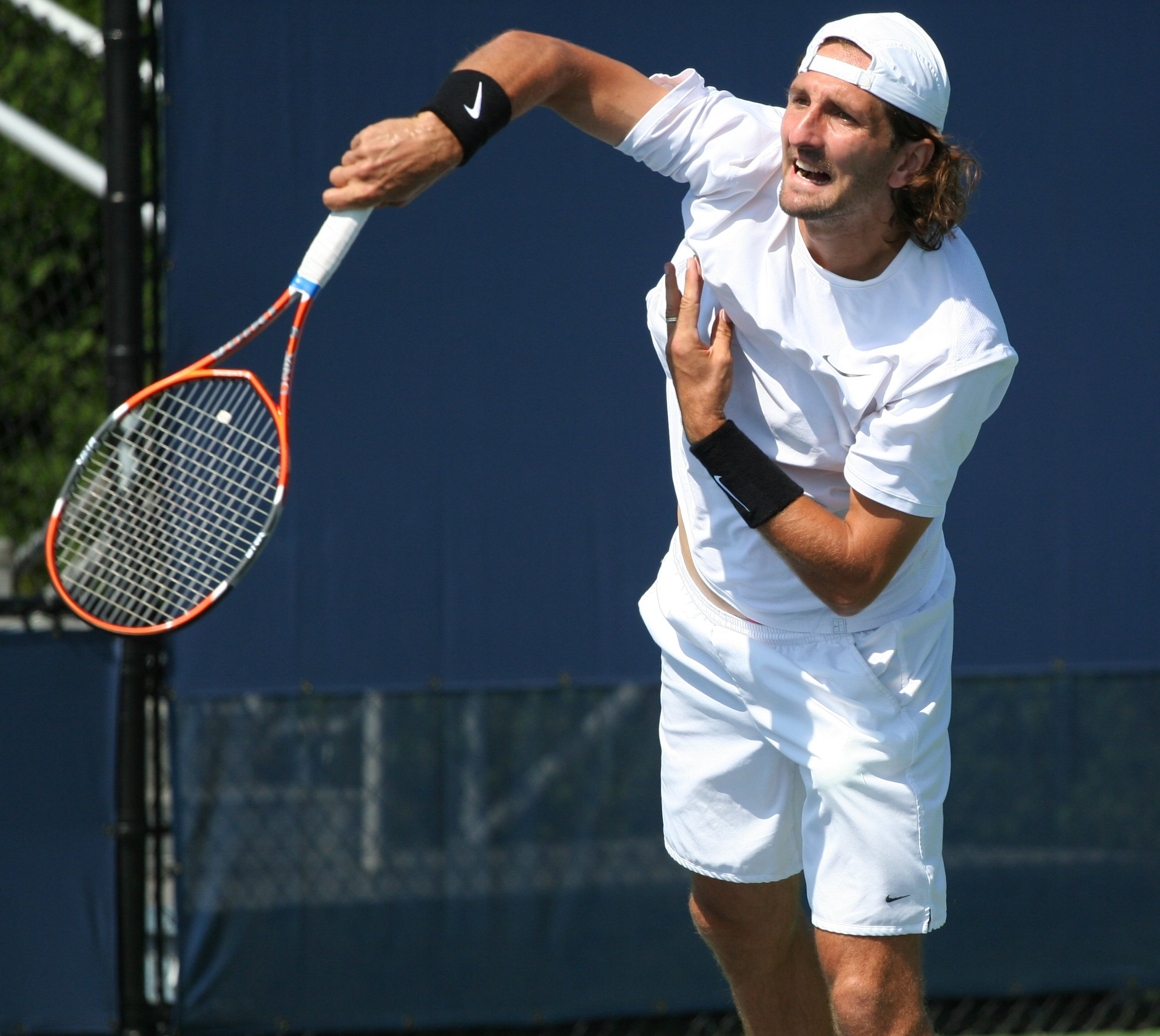 U.S. Open Saturday, Sept. 5, 2009